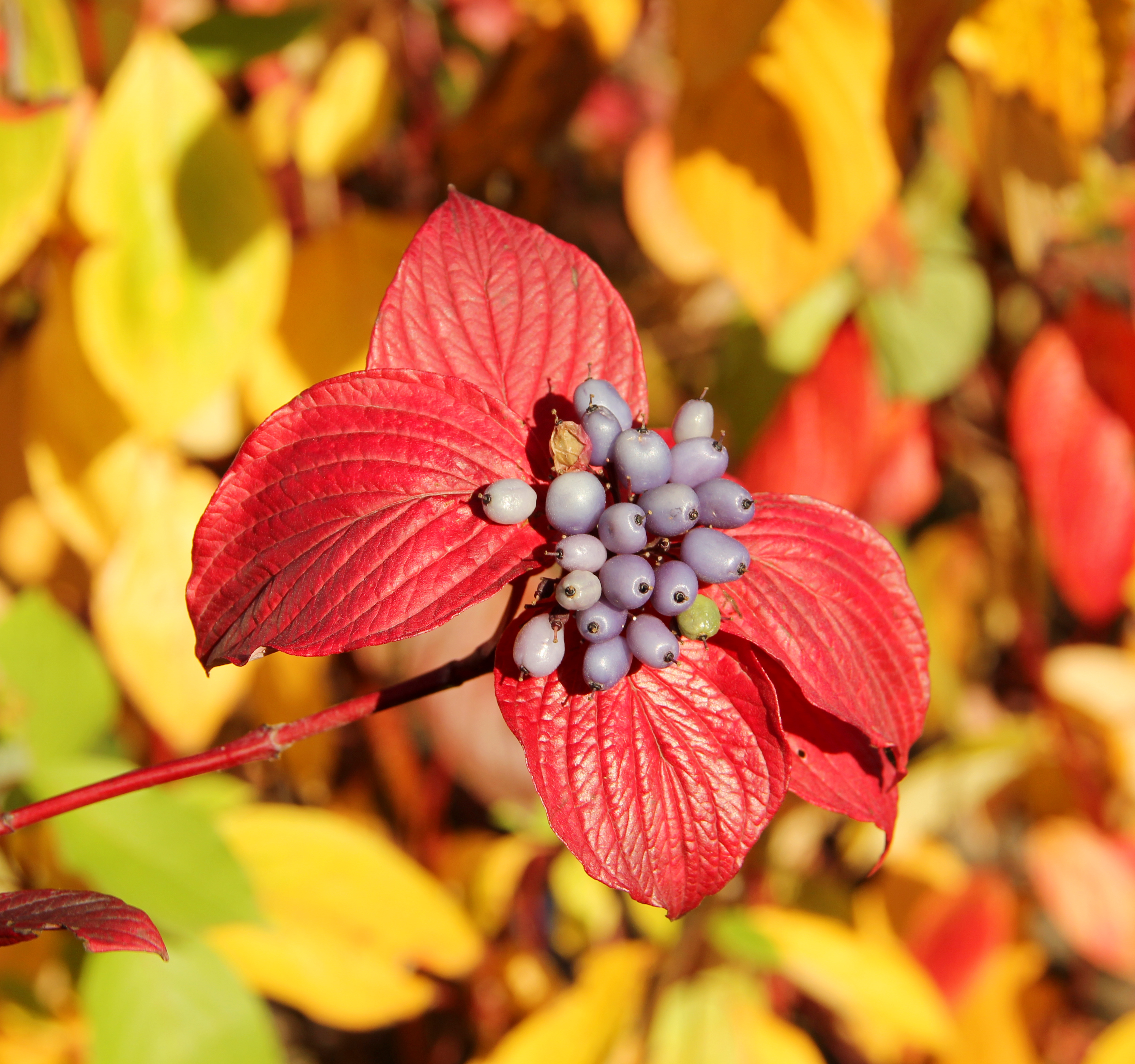 Cornus Alba. Дерен белый осенью. Плоды.